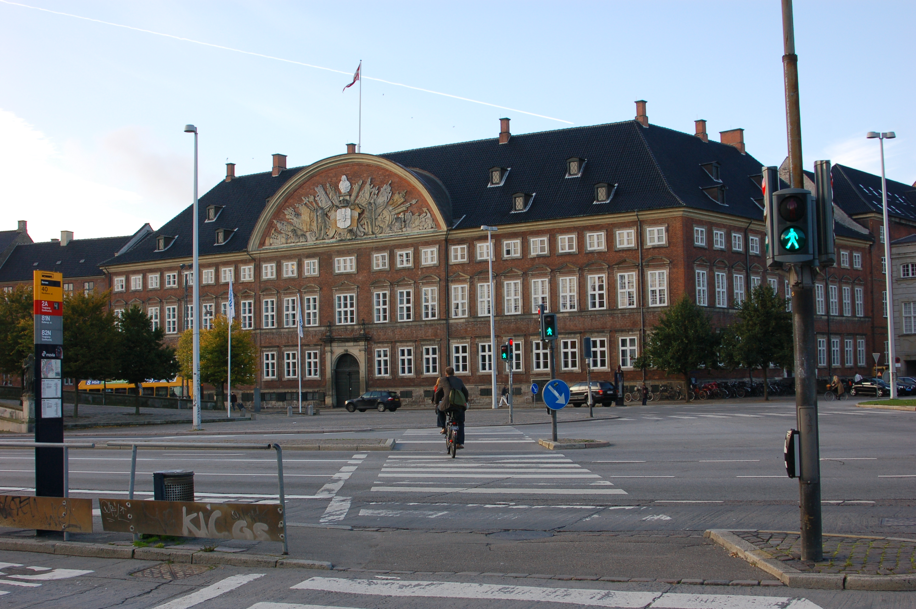 Røde bygning i København der Danske kanselli holdt til